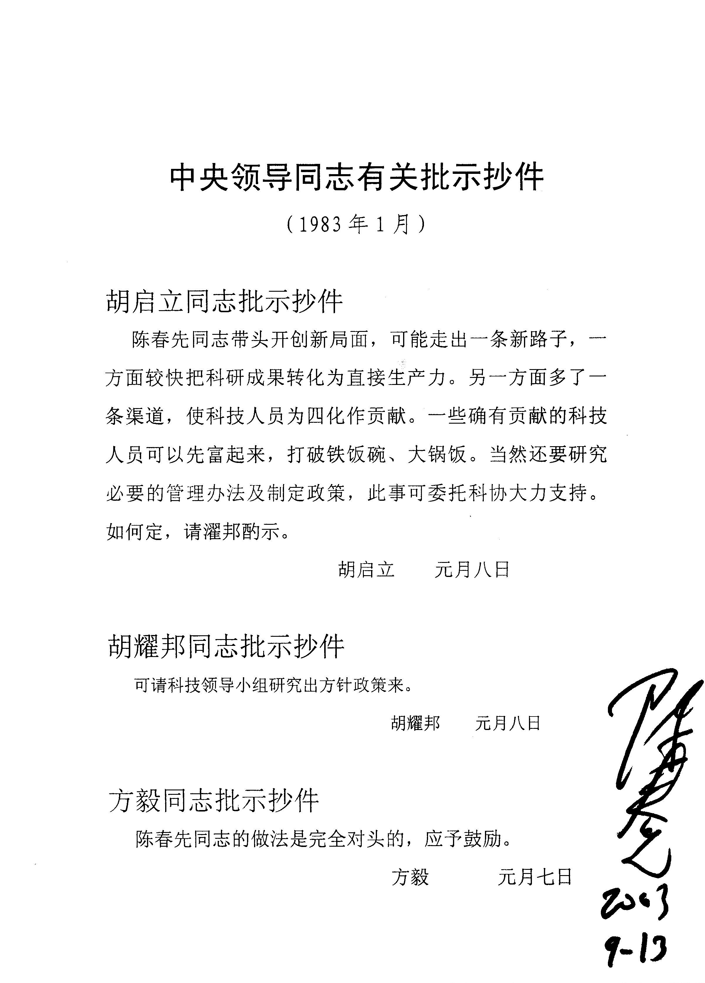 关于北京等离子体学会先进技术发展服务部的批示抄件（1983年1月）与陈春先的签字（2003年9月）